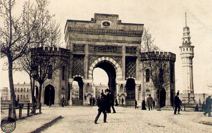 İstanbul Üniversitesi Merkez